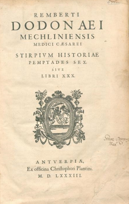 Dodonaeus, tr. Clusius, Pemptades sex title page